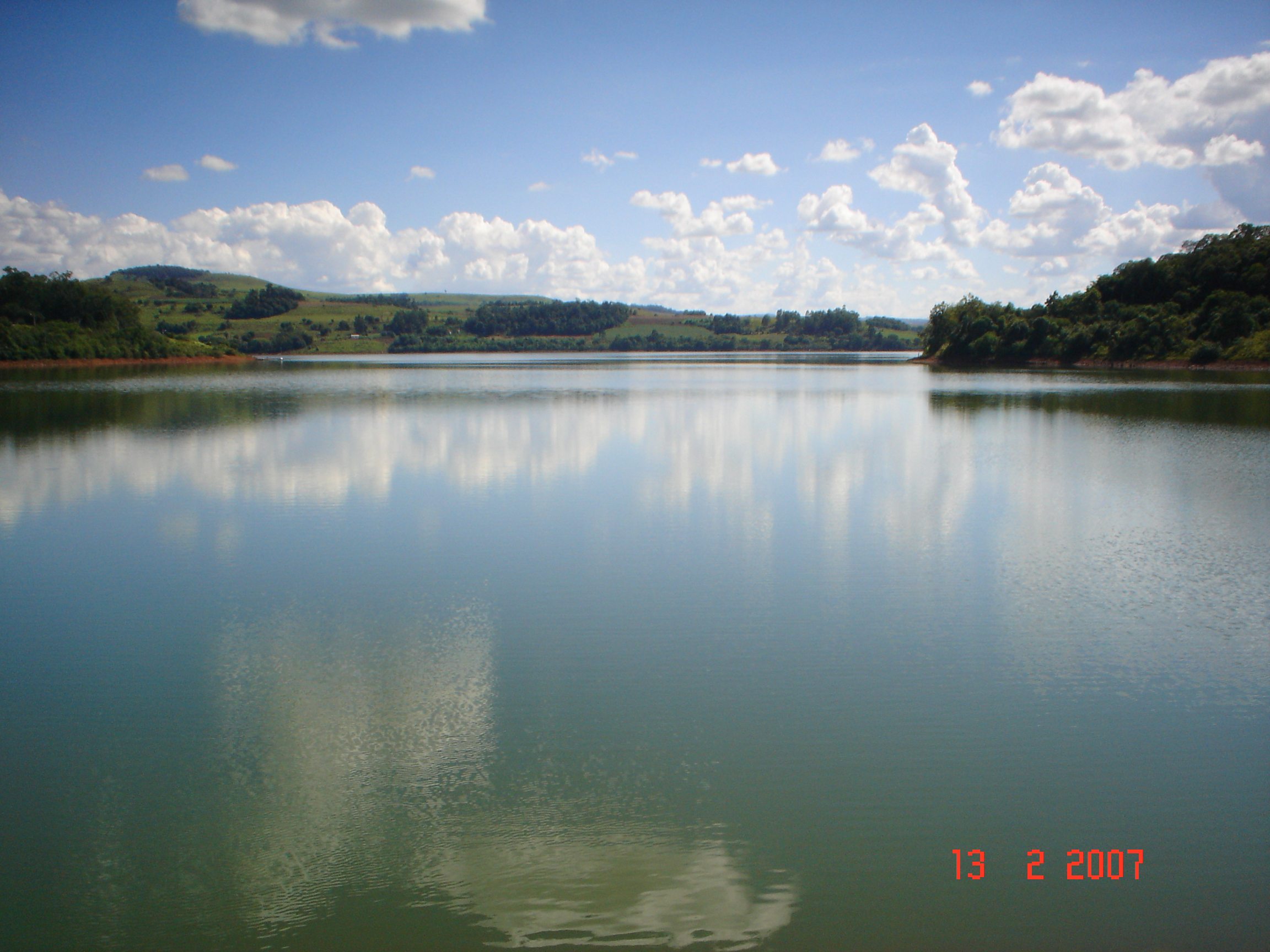 Represa da Usina de Itá, Santa Catarina, Brasil.